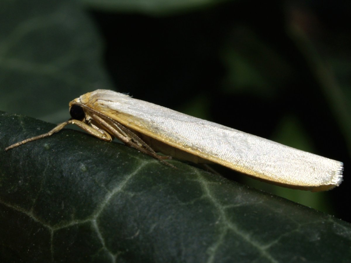 Eilema caniola